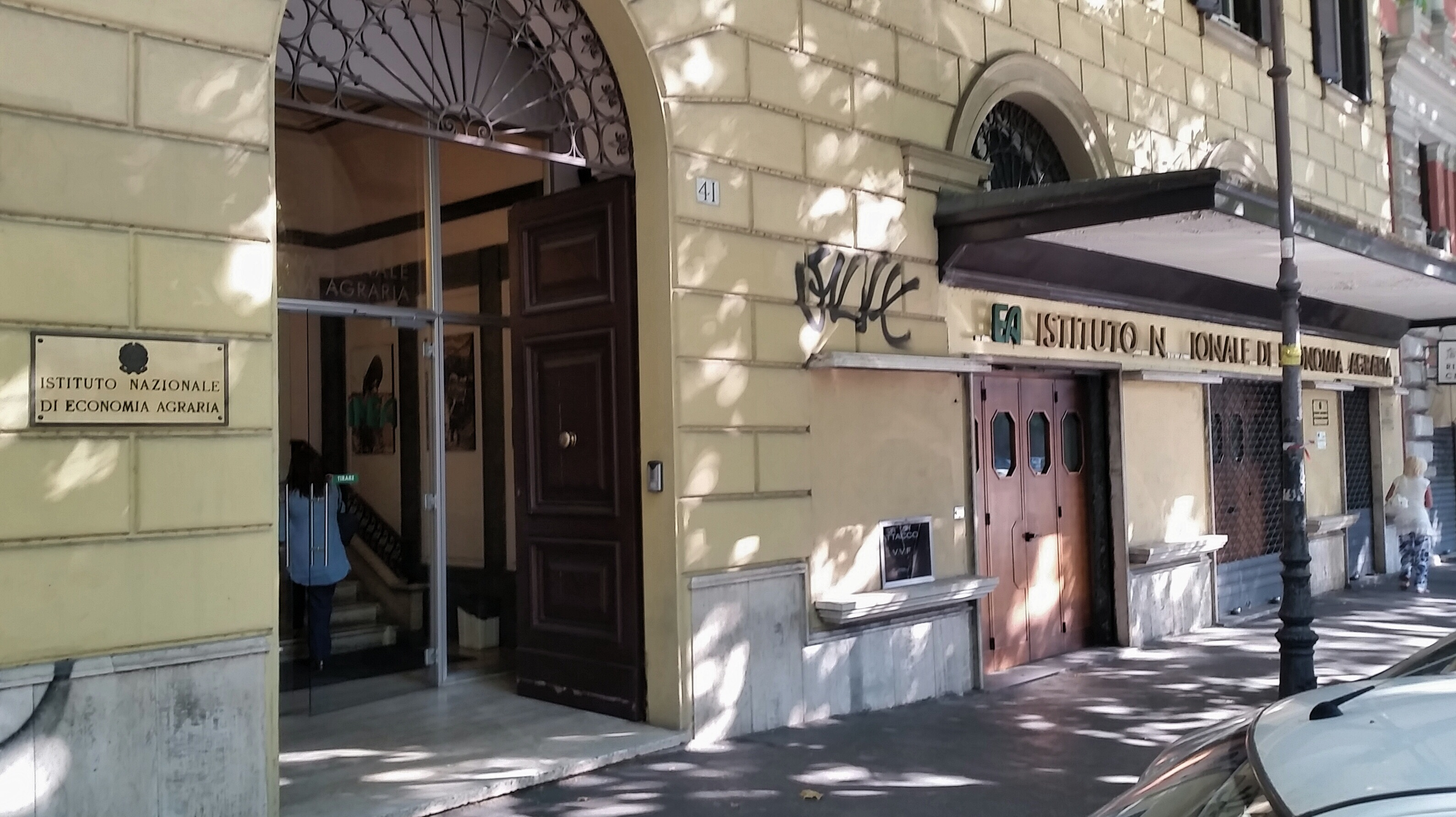 Sede centrale INEA a Roma.